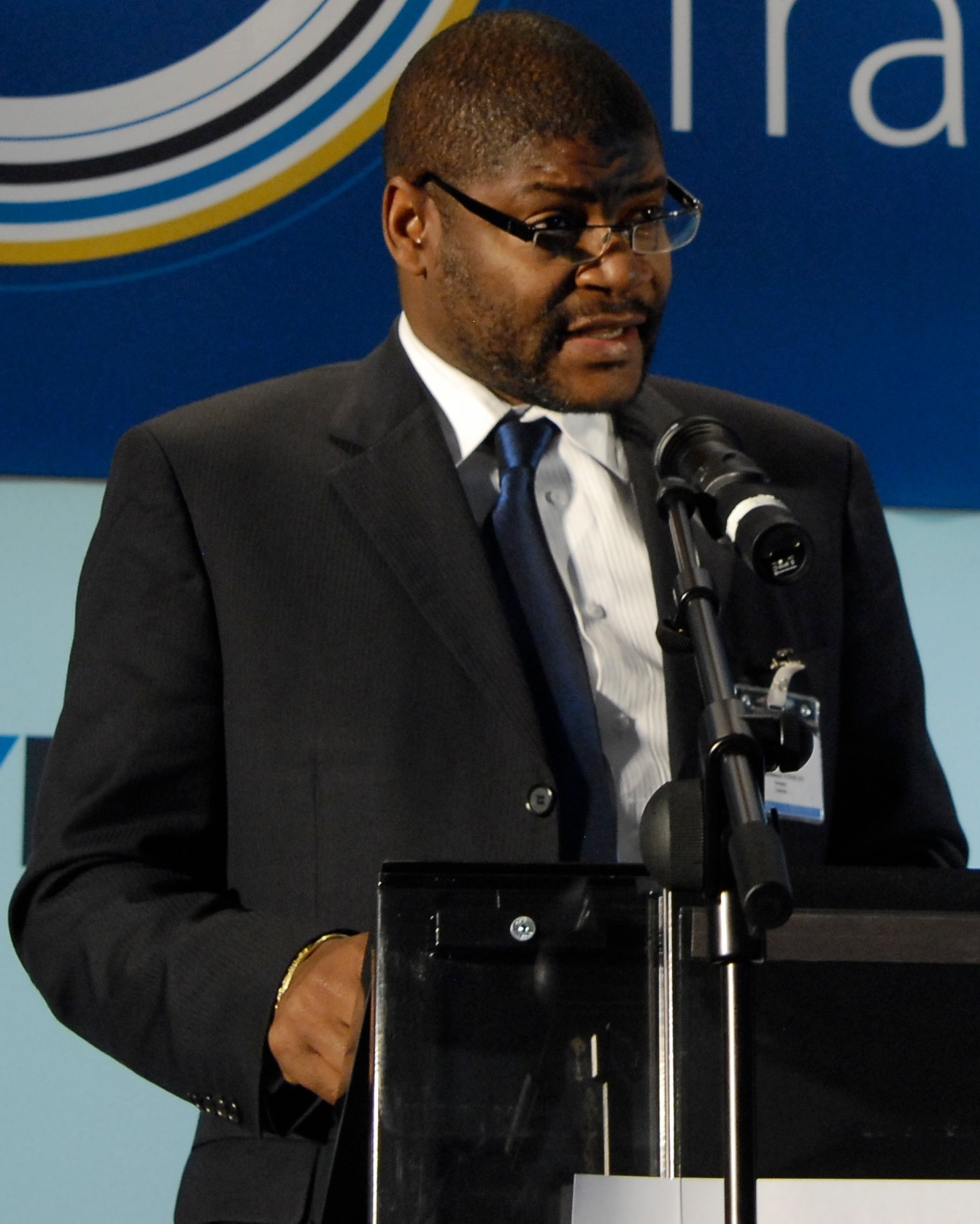 EITI Stakeholders Forum